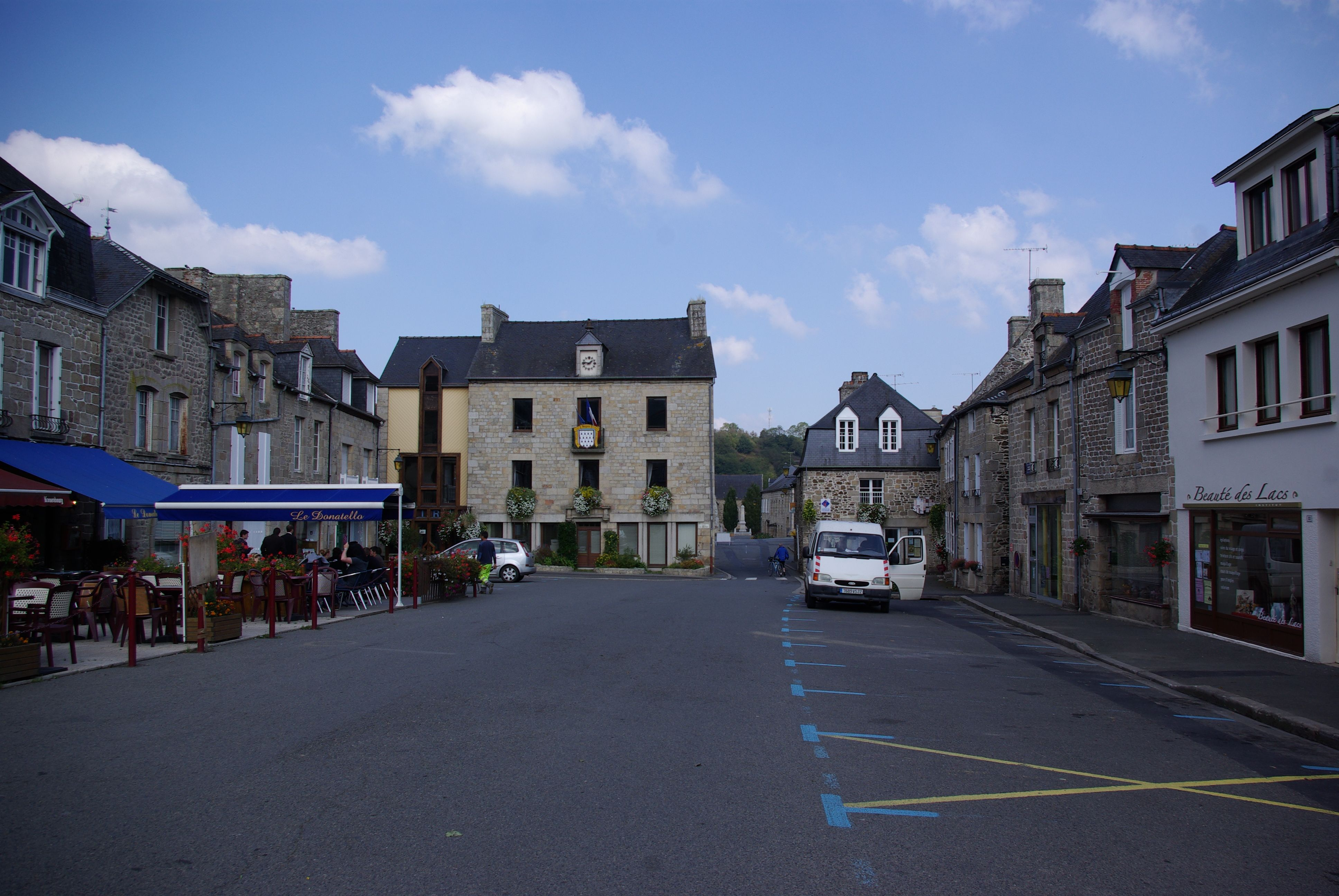 Jugon-les-Lacs in der Bretagne, Frankreich. Zu sehen ist der Markt. Am Ende rechts das Rathaus, links der schmalen Straße das Fremdenverkehrsbüro (geotags in den EXIF-Daten).